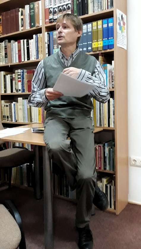 Munka közben